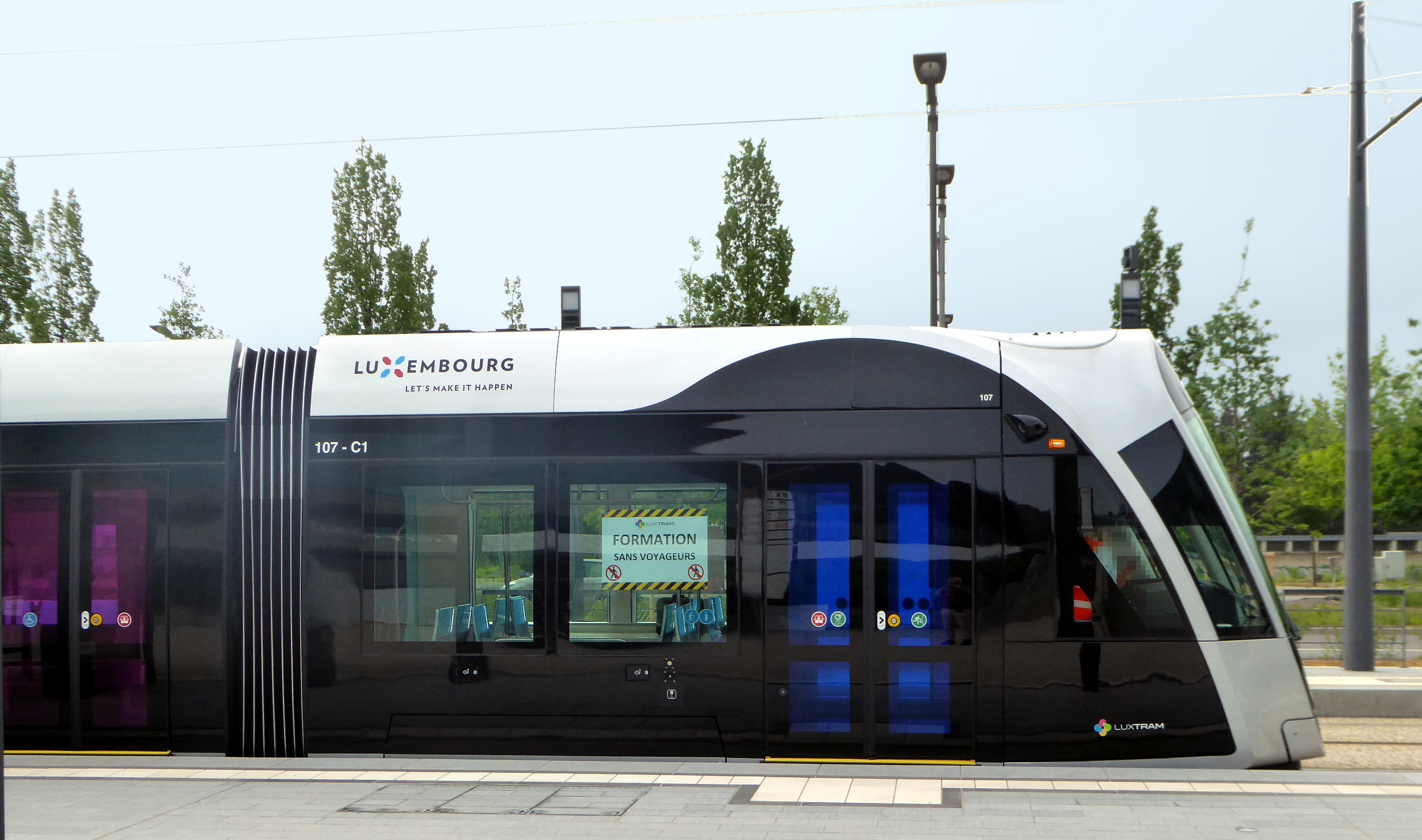 Luxemburg, Fahrschul-Straßenbahn.